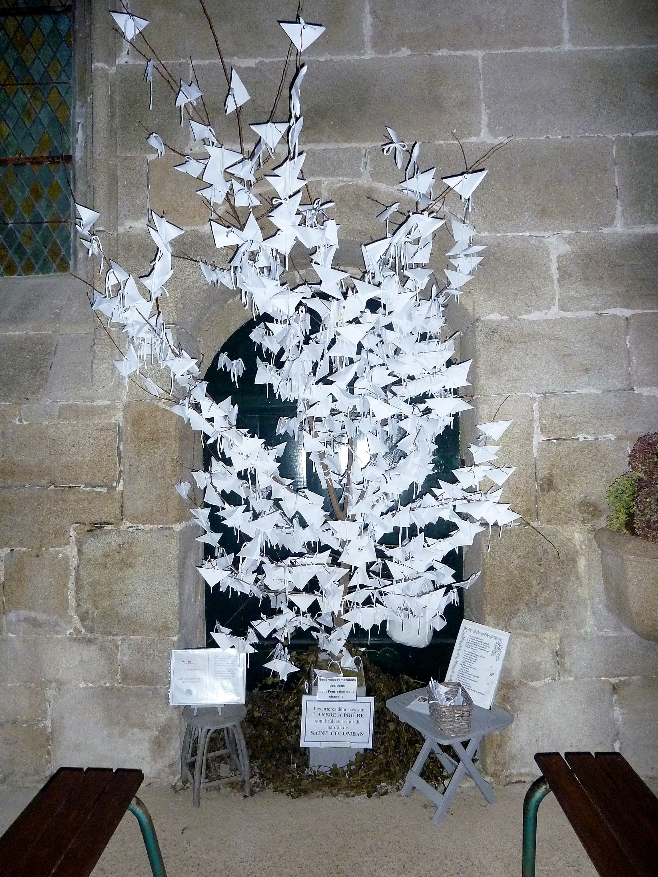 Carnac, chapelle Saint-Colomban : arbre à prières (les prières déposées sur les papiers pliés composant cet arbre sont brûlées le jour du Pardon de Saint-Colomban)